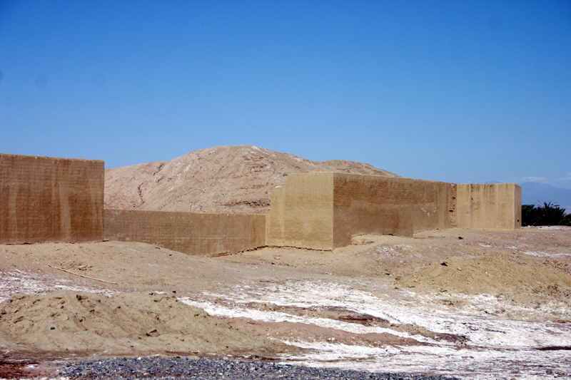 Саха тыла: daghyanos